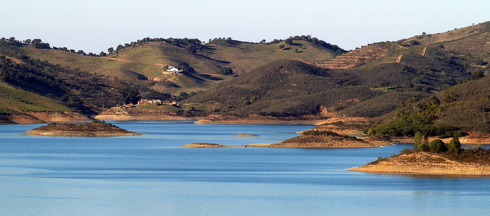 image prise le soir à partir de la fenêtre de notre chambre